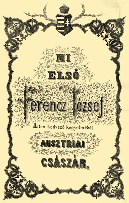 Az 1867, évi kiegyezési törvénycikkek első lapja.